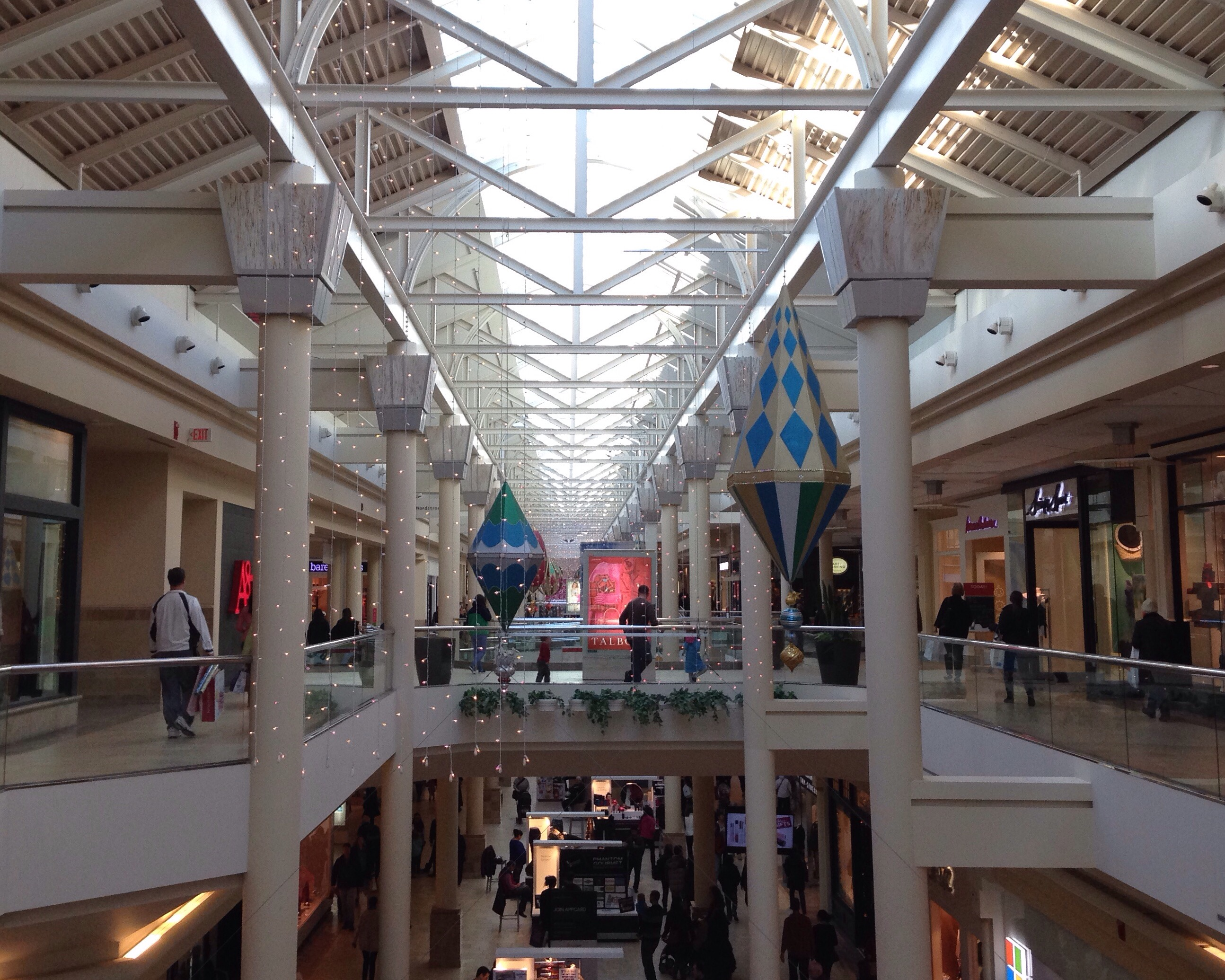 Mall in Burlington, Massachusetts